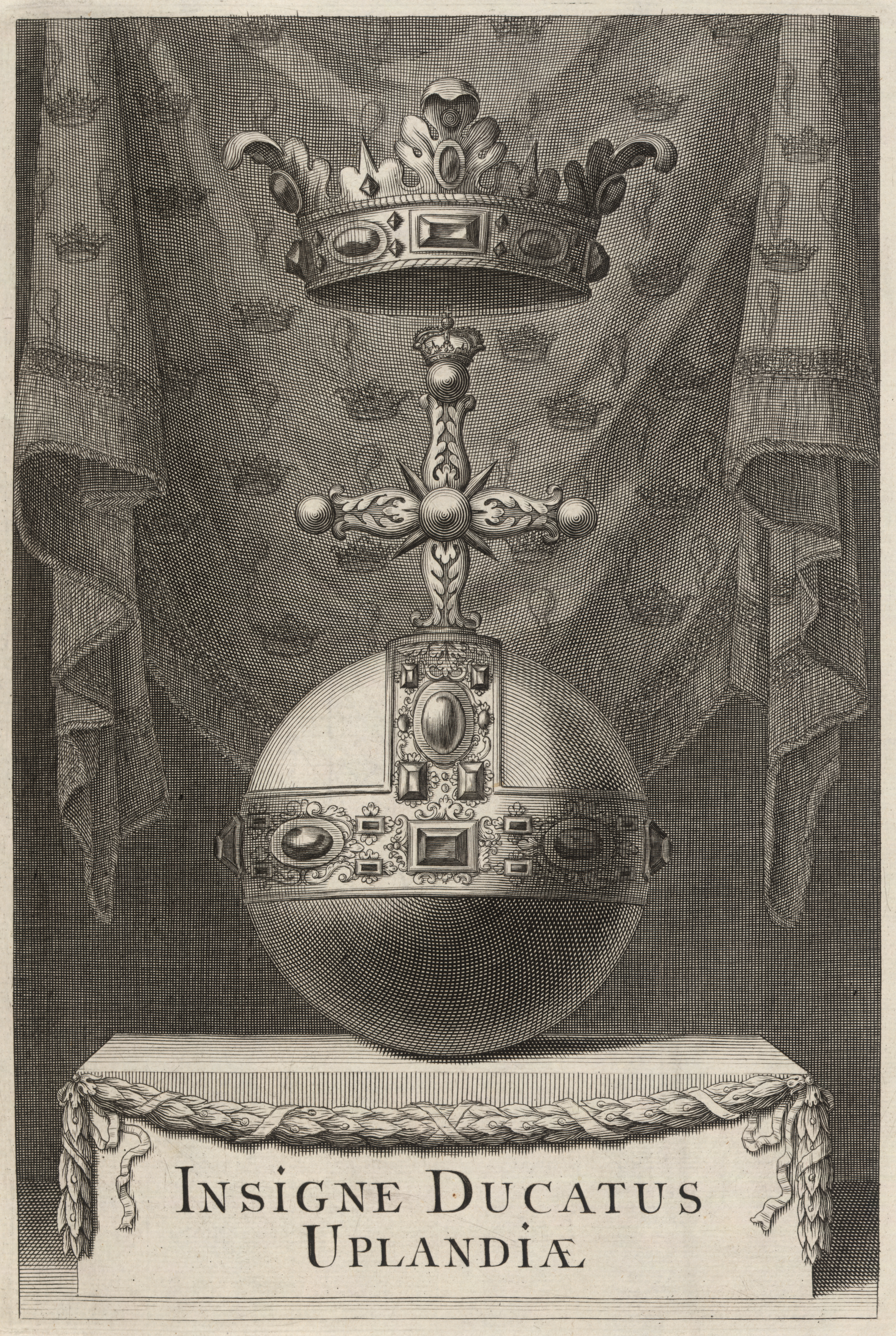 Titel i svensk övers. : Hertigdömet Upplands vapen